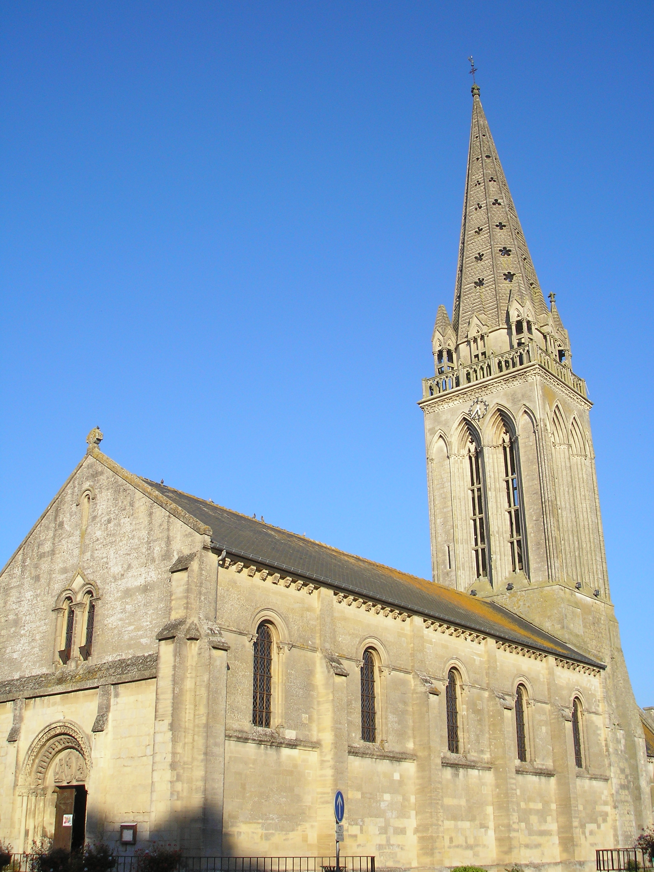 Bretteville-l'Orgueilleuse (Normandie, France). L'église Saint-Germain.